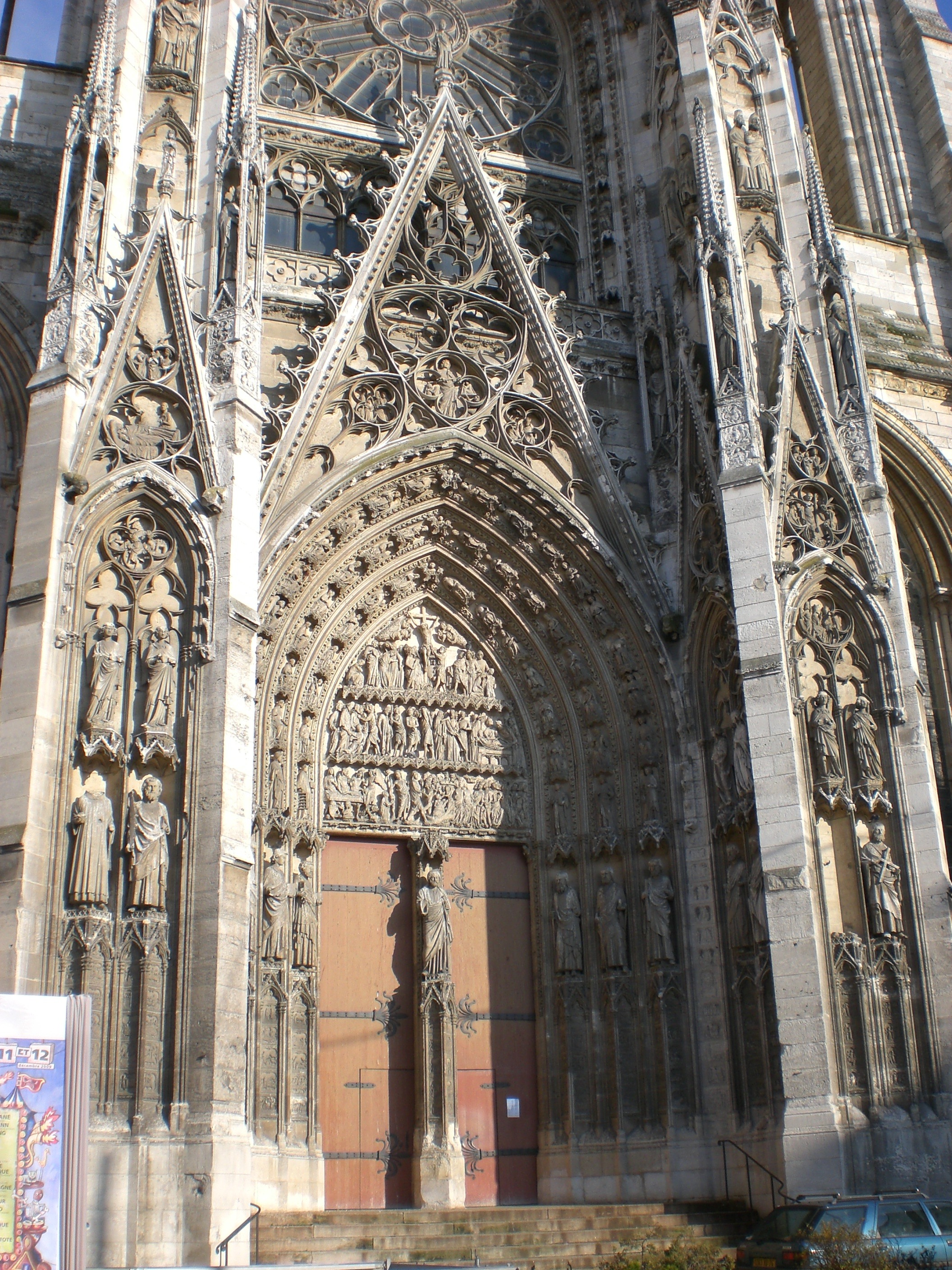 Rouen, Cathédrale Notre-Dame, Portail de la Calende